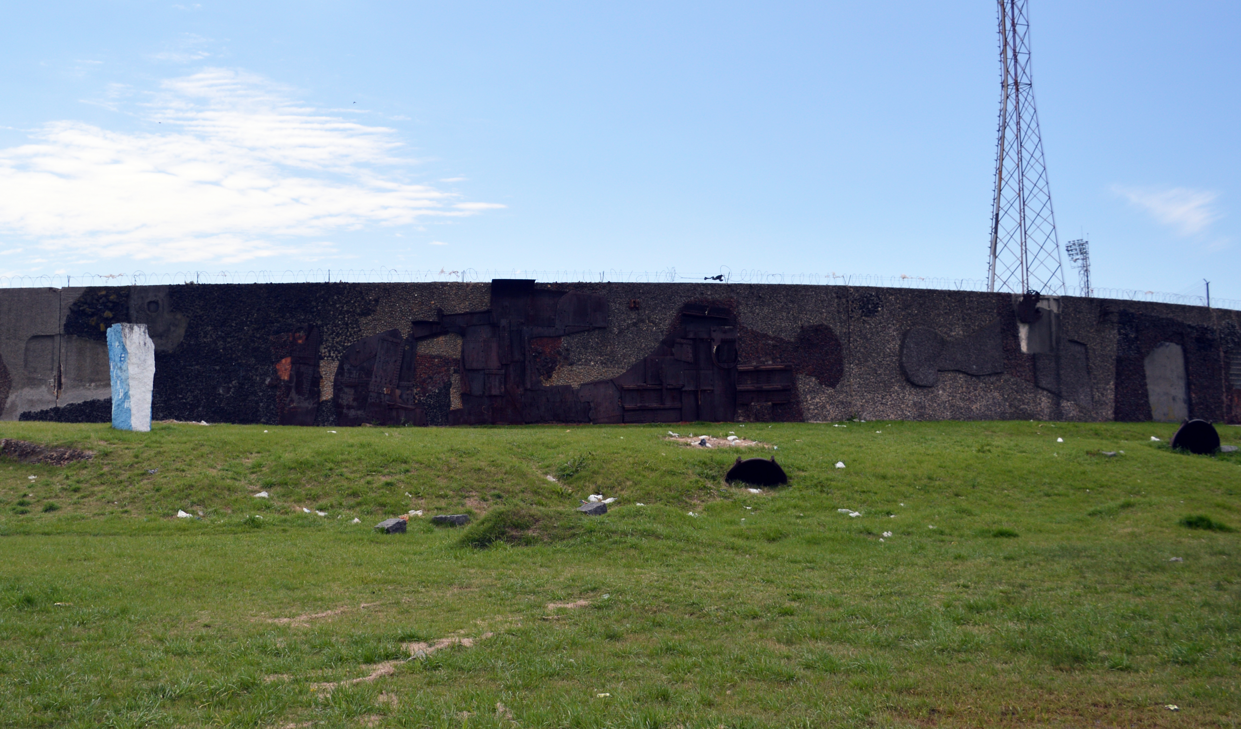 Mural del artista Leopoldo Novoa. Estadio Luis Tróccoli. Ubicada en el departamento de Montevideo